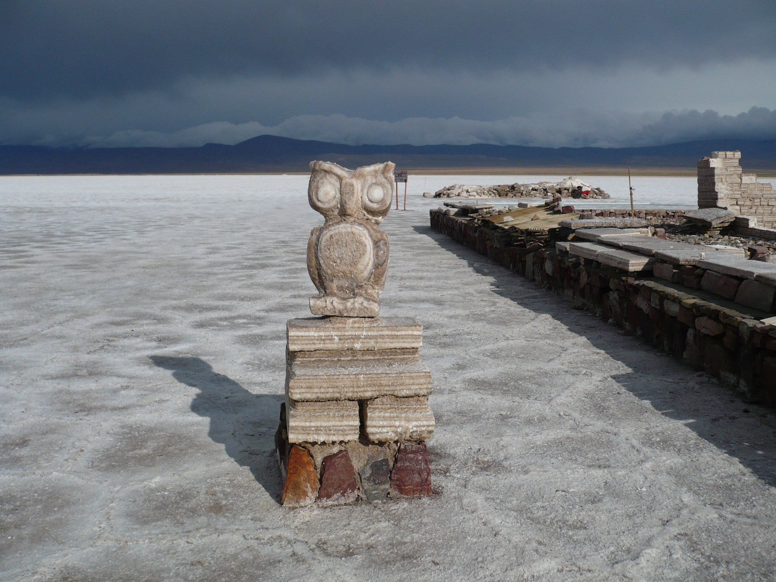 Escultura de una lechuza hecha con sal. Salinas Grandes, (Salta y Jujuy), Argentina